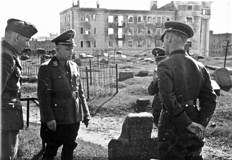 Minsk, Mai 1943 Gauleiter Kube auf dem polnischen Friedhof in Minsk. Er veranlasst den ERR, 2 Grabsteine sicherzustellen. Auf dem Bild Gauleiter Kube, sein Adju. Dr. Richel und Greinke. Film und Bild-Nr.: F.R. 17/1 Information added by Wikimedia users.Беларуская (тарашкевіца): Гаўляйтэр Кубэ аддае распараджэньне на каталіцкіх залатагорскіх могілках у Менску. Цяпер гэта каля скрыжаваньня вуліцы Казлова і праспэкту Незалежнасьці. На выяве таксама ад’ютант Кубэ. Менск, БССР. Травень 1943 году.